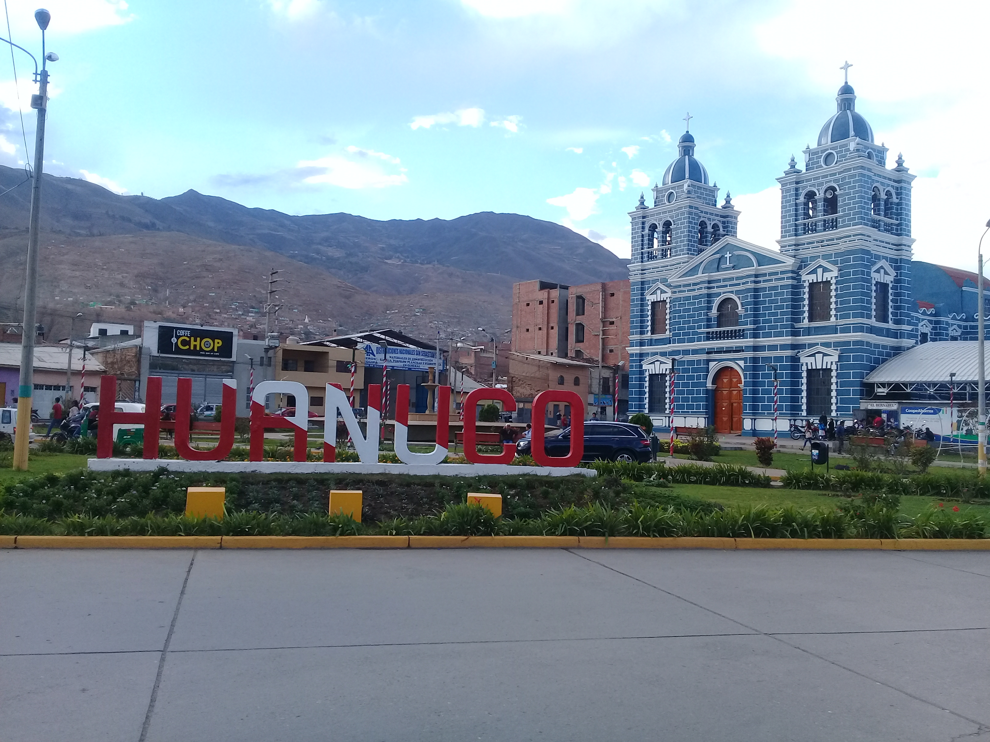 Templo San Sebastián de la ciudad de Huánuco en la plazuela del mismo nombre, en Perú...